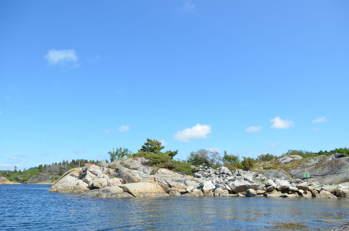 Skudesundskjærene har tydelige spor etter sprengning og innsamling fra tiden før fredningen.